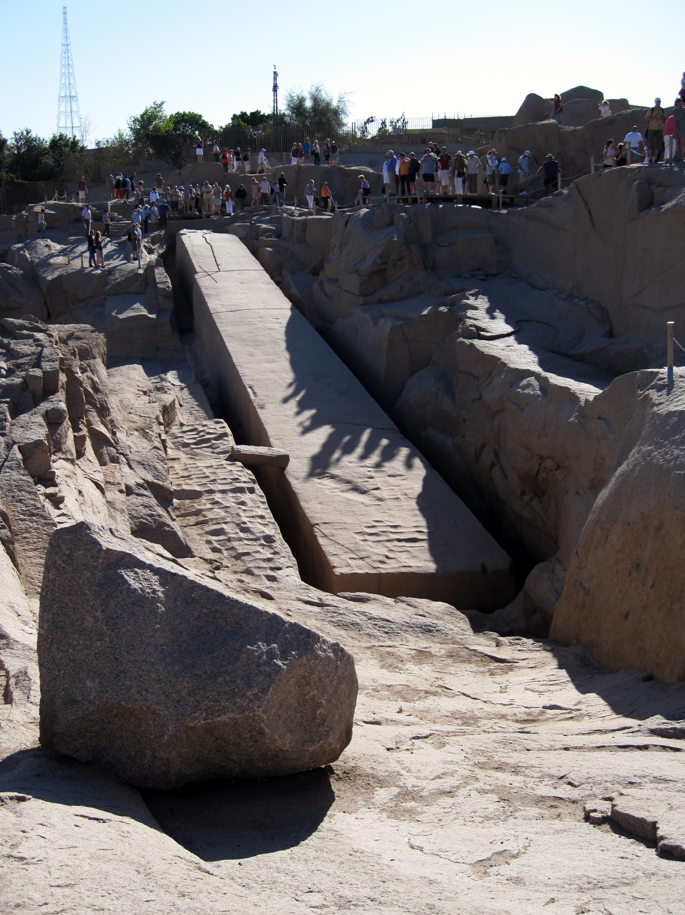 Unvollendeter Obelisk in Assuan, Ägypten